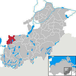 Kratzeburg in Mecklenburg-Vorpommern, Landkreis Mecklenburg-Strelitz